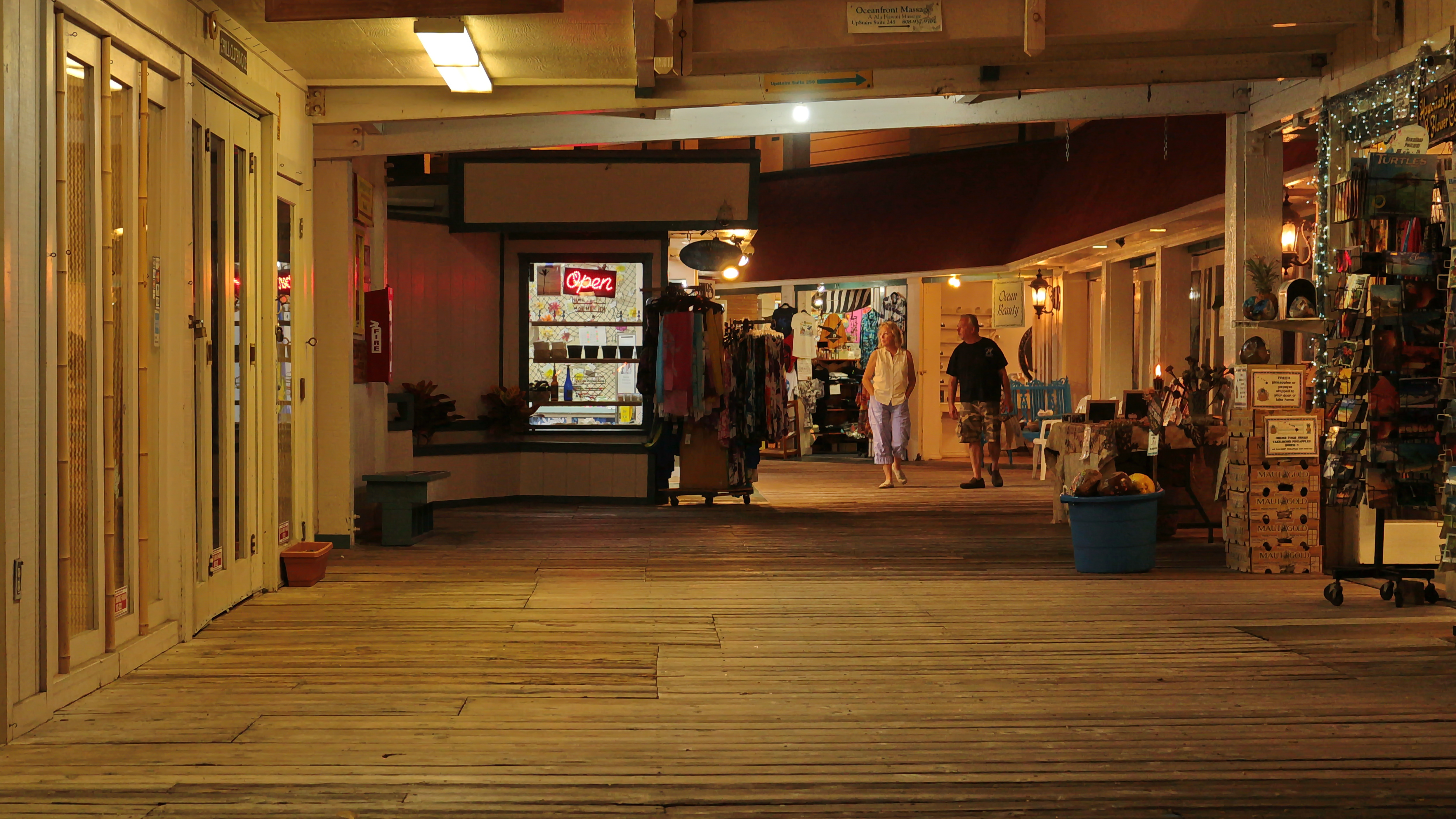 Kona Inn Shopping Village, Alii Drv, Kailua-Kona, Big Island, Hawaii, United States